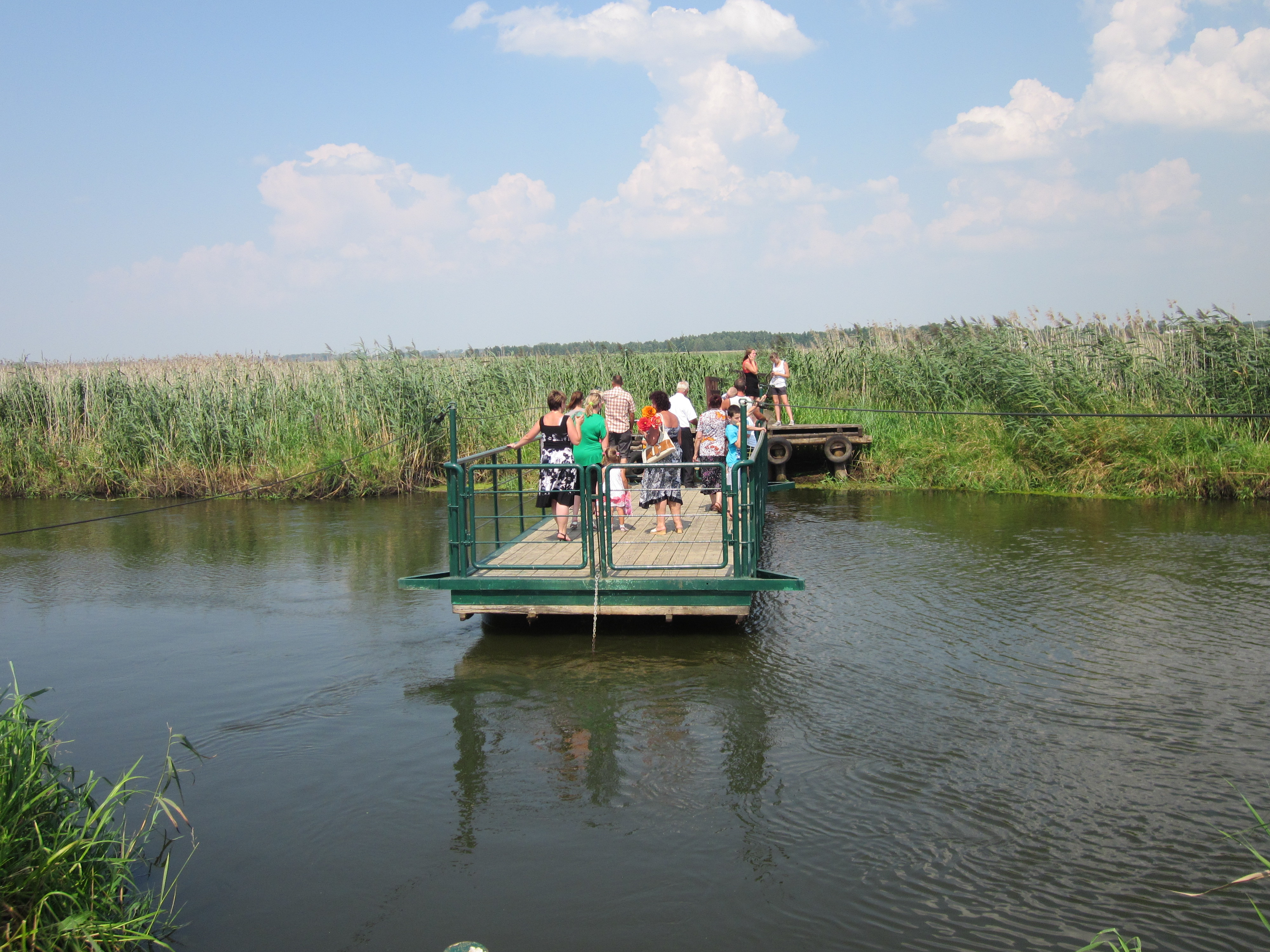 Platforma ta znajduje sie na trasie kładki edukacyjnej z Waniewa do Śliwna. Dzięki takiemu rozwiązaniu osoby na pychówkach mogą przepłynąć rzeką Narew bez problemu.